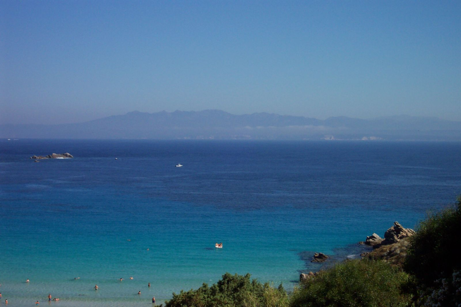 Le coste della Corsica viste dalla Sardegna